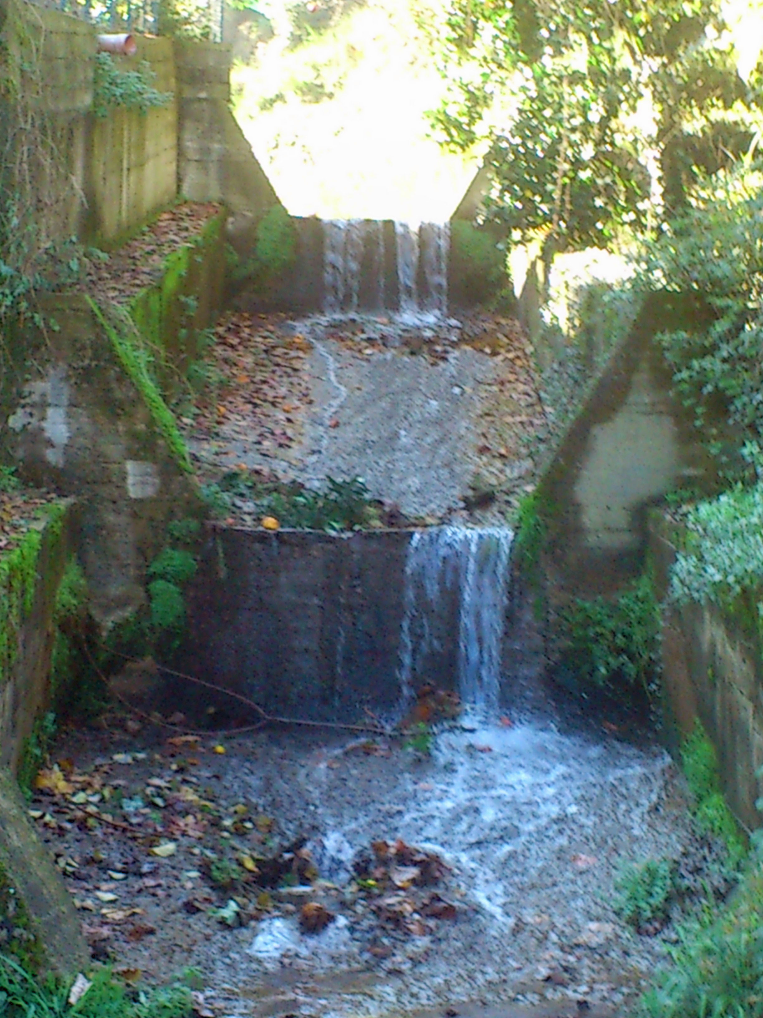 Torrente Ceramida, San Pietro di Caridà